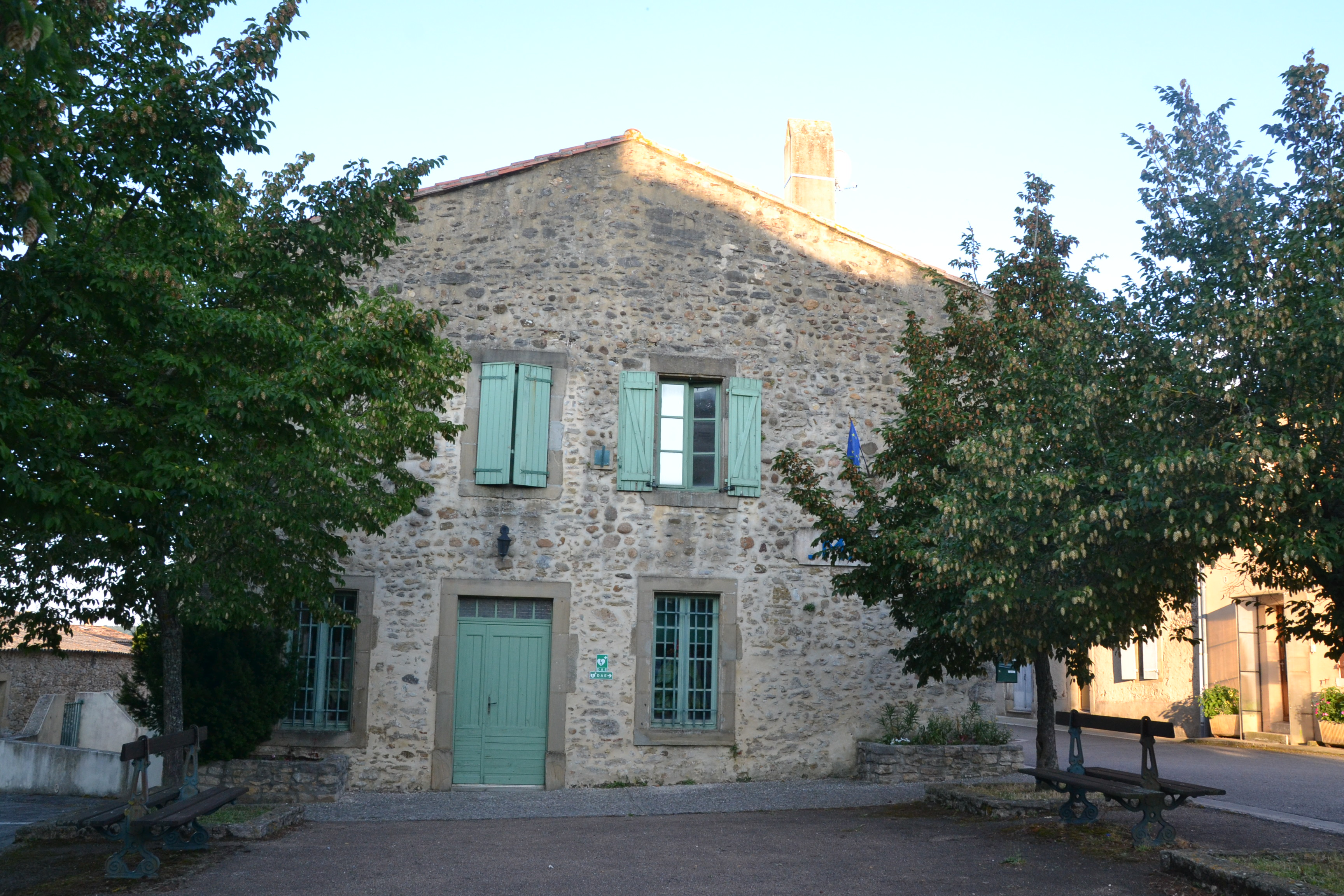 Mairie de Caudeval (Val de Lambronne, Aude, France).